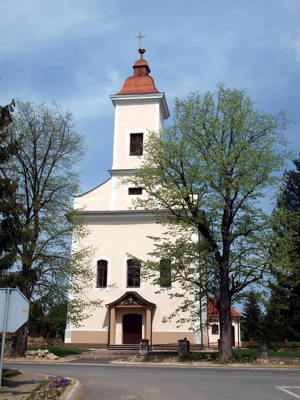 Crkva sv. Ivana Apostolskog u Podcrkavlju, Brodsko-posavska županija.